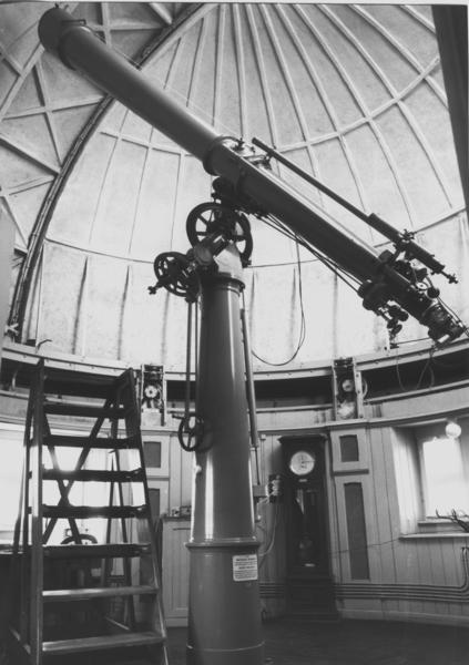 Six Stage Steinheil Refracting Telescope